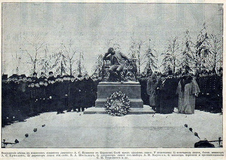 100-летие Александровского(Царскосель.) лицея в Царском Селе(ныне Пушкин) у памятника бывшему лицеисту А.С.Пушкину, янв.1912г.